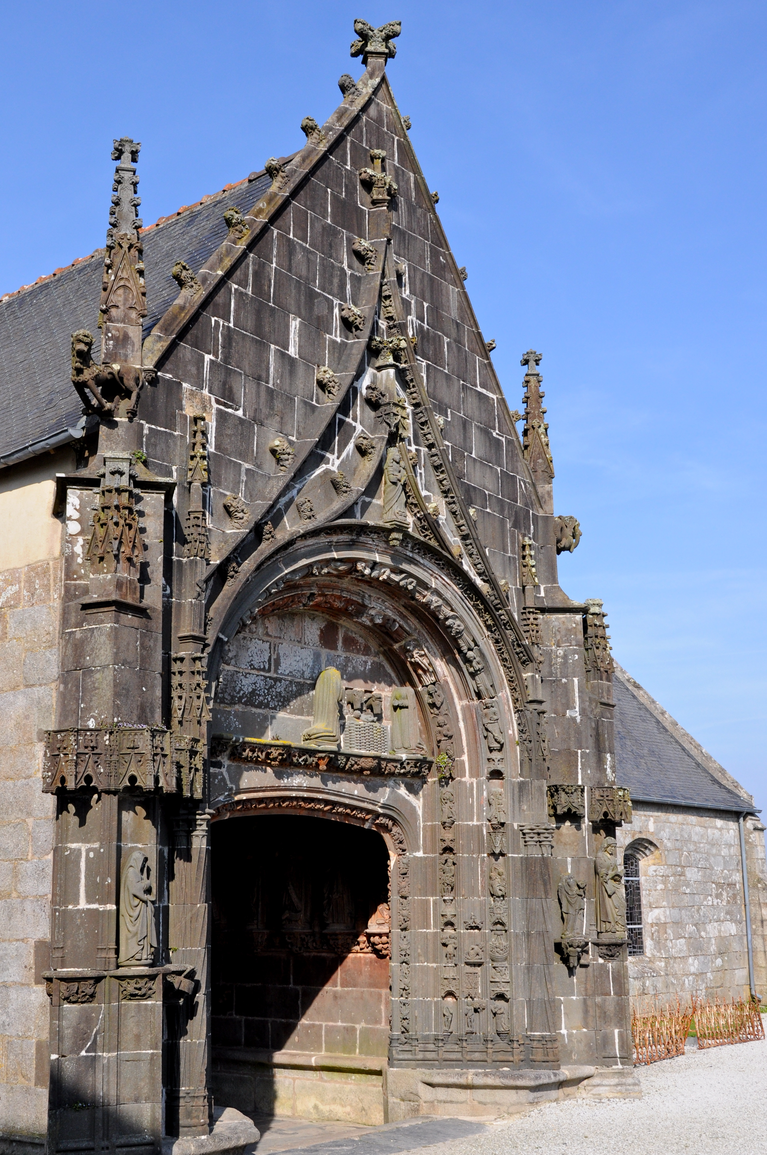 Entrée du porche de l'église Notre-Dame de PENCRAN